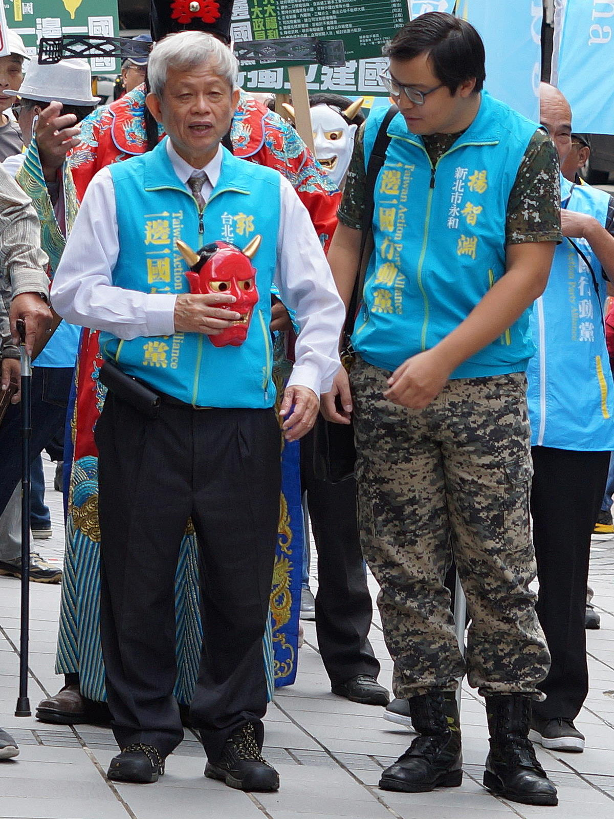 一邊一國行動黨臺北市第四選舉區立法委員候選人郭正典（左）、一邊一國行動黨新北市第九選舉區立法委員候選人楊智淵（右），率隊赴民主進步黨臺北市議員高嘉瑜服務處抗議。